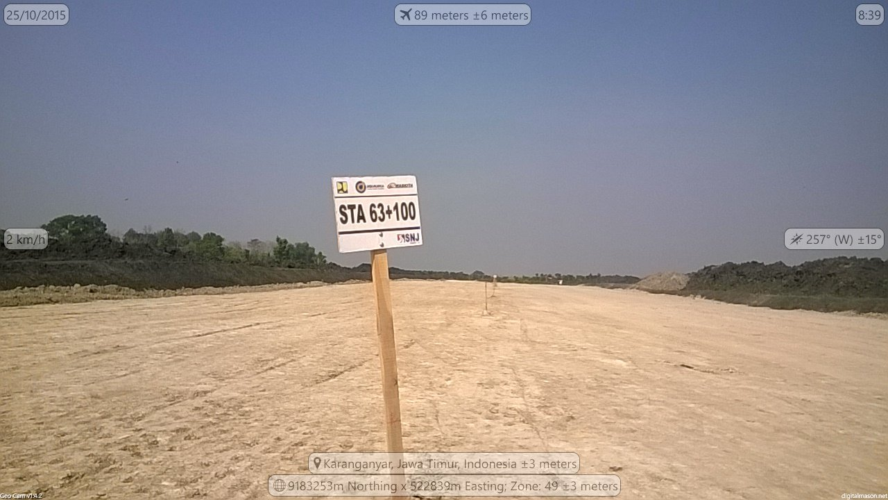 Pembangunan alan tolyang membelah Desa Kauman